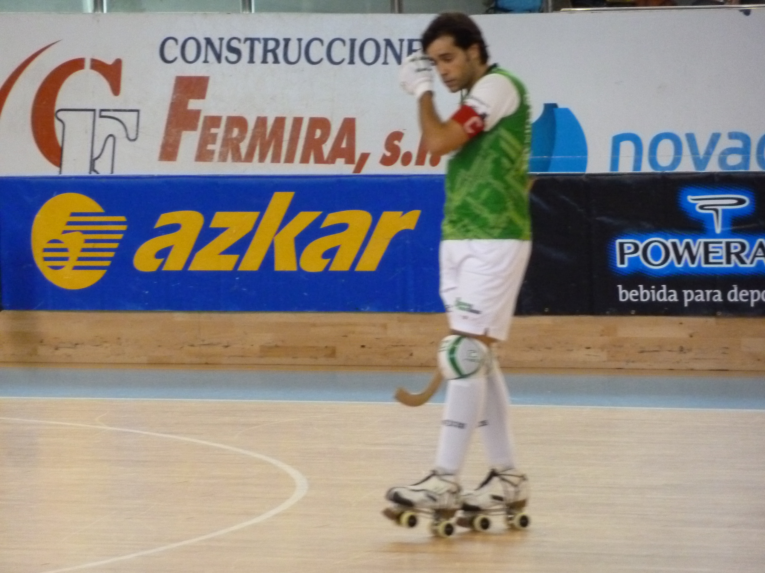 Quecemento do HC Liceo no partido de hóckey entre o HC Liceo e o CP Vic en partido da OK liga no Pazo dos deportes de Riazor na Coruña.